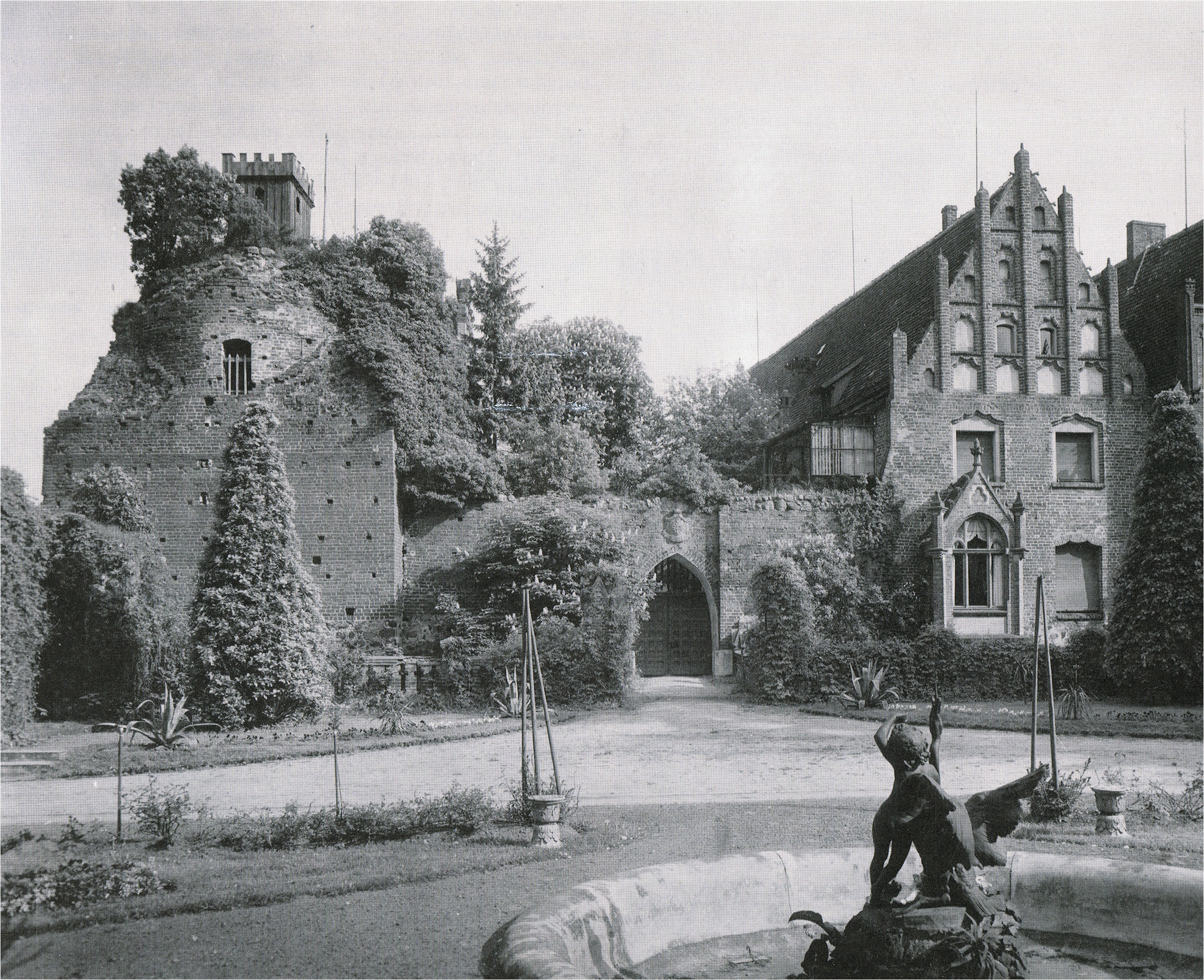 Widok zamku w Pęzinie od strony południowej. Zdjęcie z ok. 1920 r.